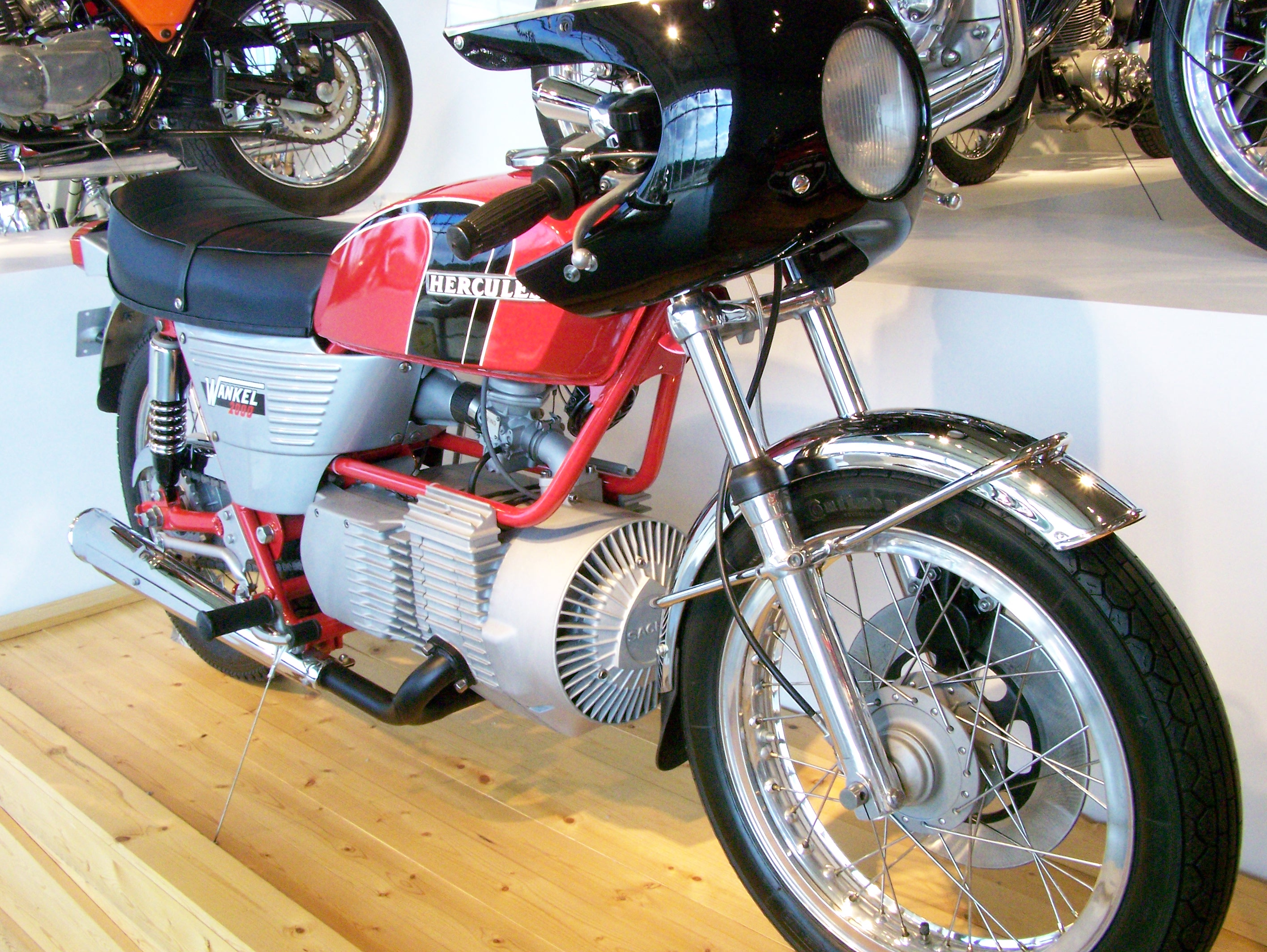 Barber Vintage Museum_417 Hercules Wankel 2000